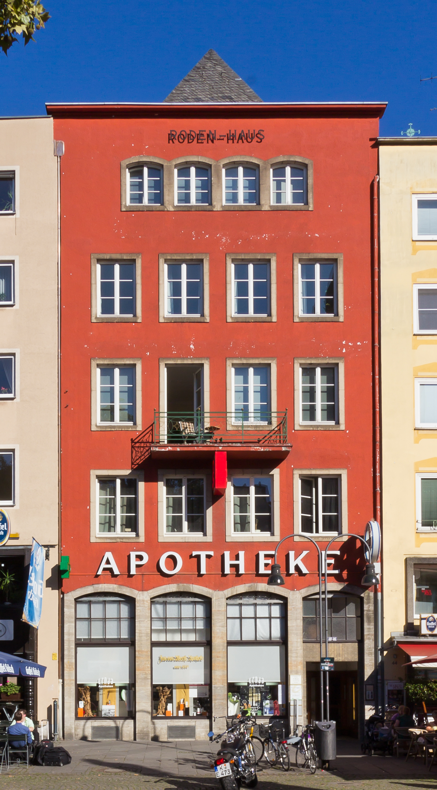 Denkmalgeschütztes Wohn- und Geschäftshaus „Roden-Haus“, Alter Markt 46-48, Köln. Architekt: Hubert Molis, Baujahr: 1951